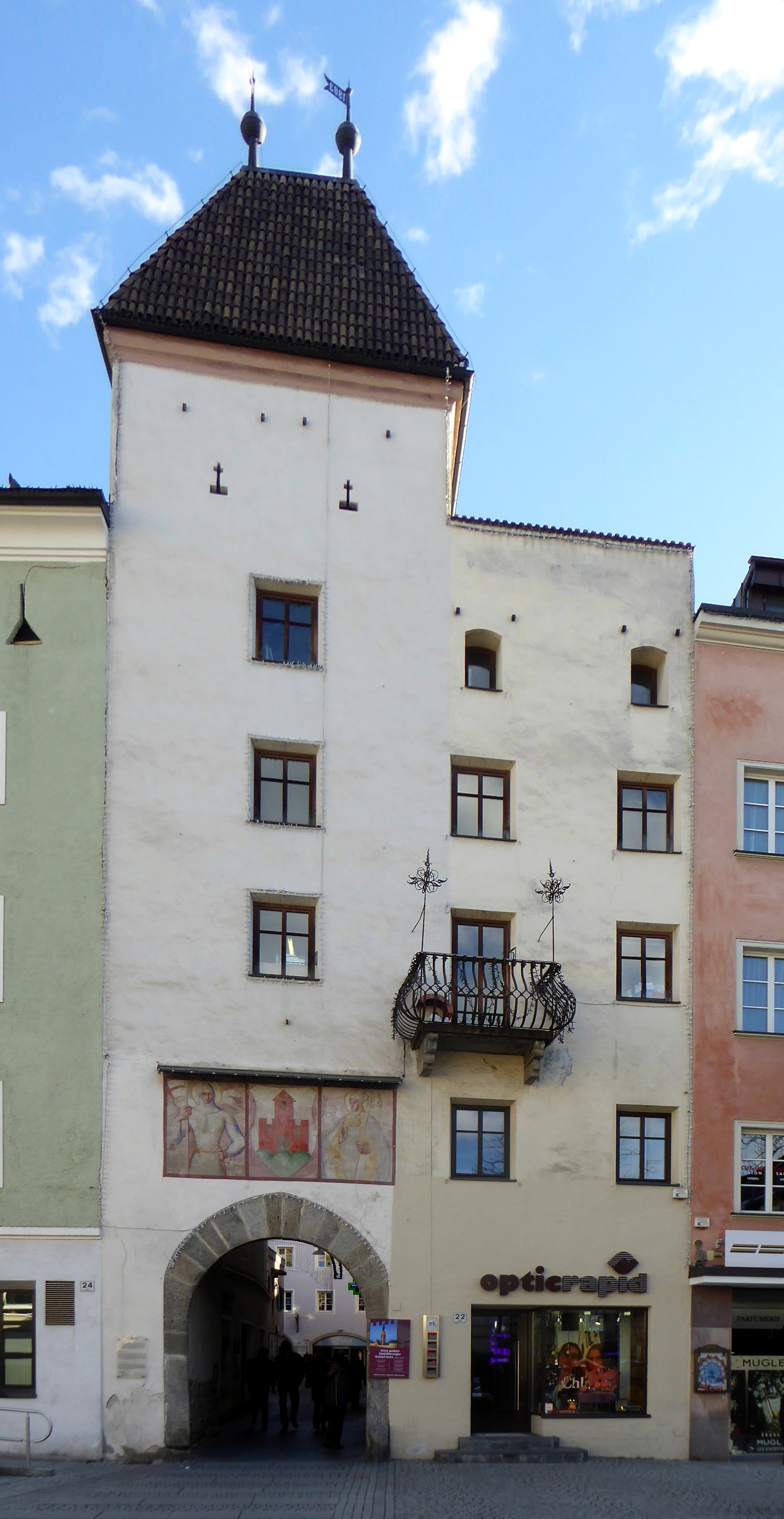 Bruneck (Südtirol), Florianitor, Feldseite (Nordseite).